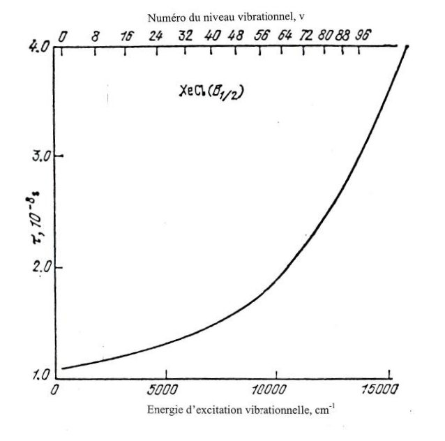 résolution vibrationnelle xecl